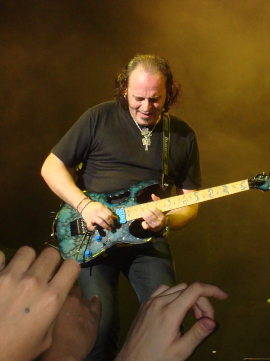 carlitos mago de oz